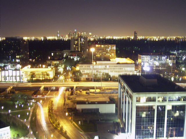 1200 Poast Oak Blvd